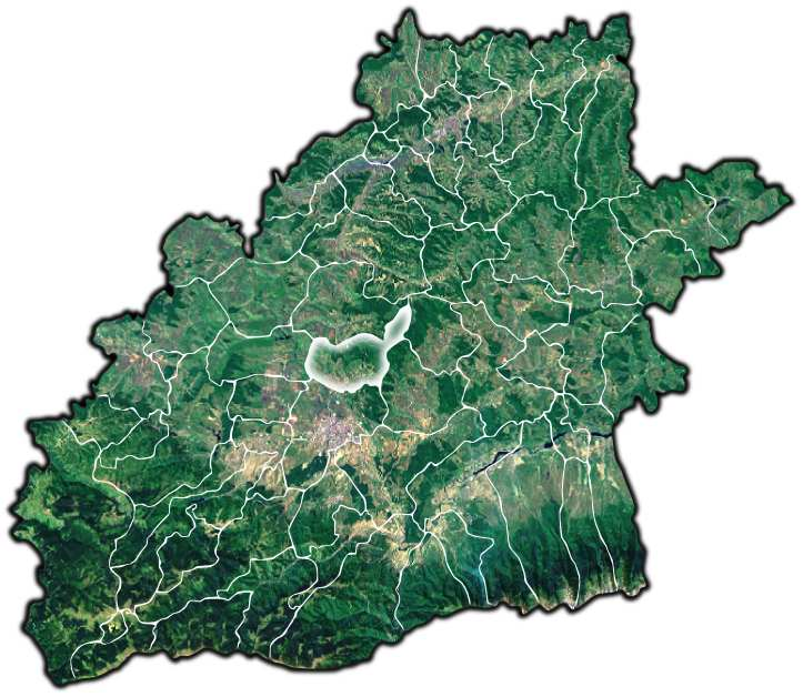 Sura Mare jud Sibiu